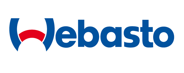 Logo Webasto